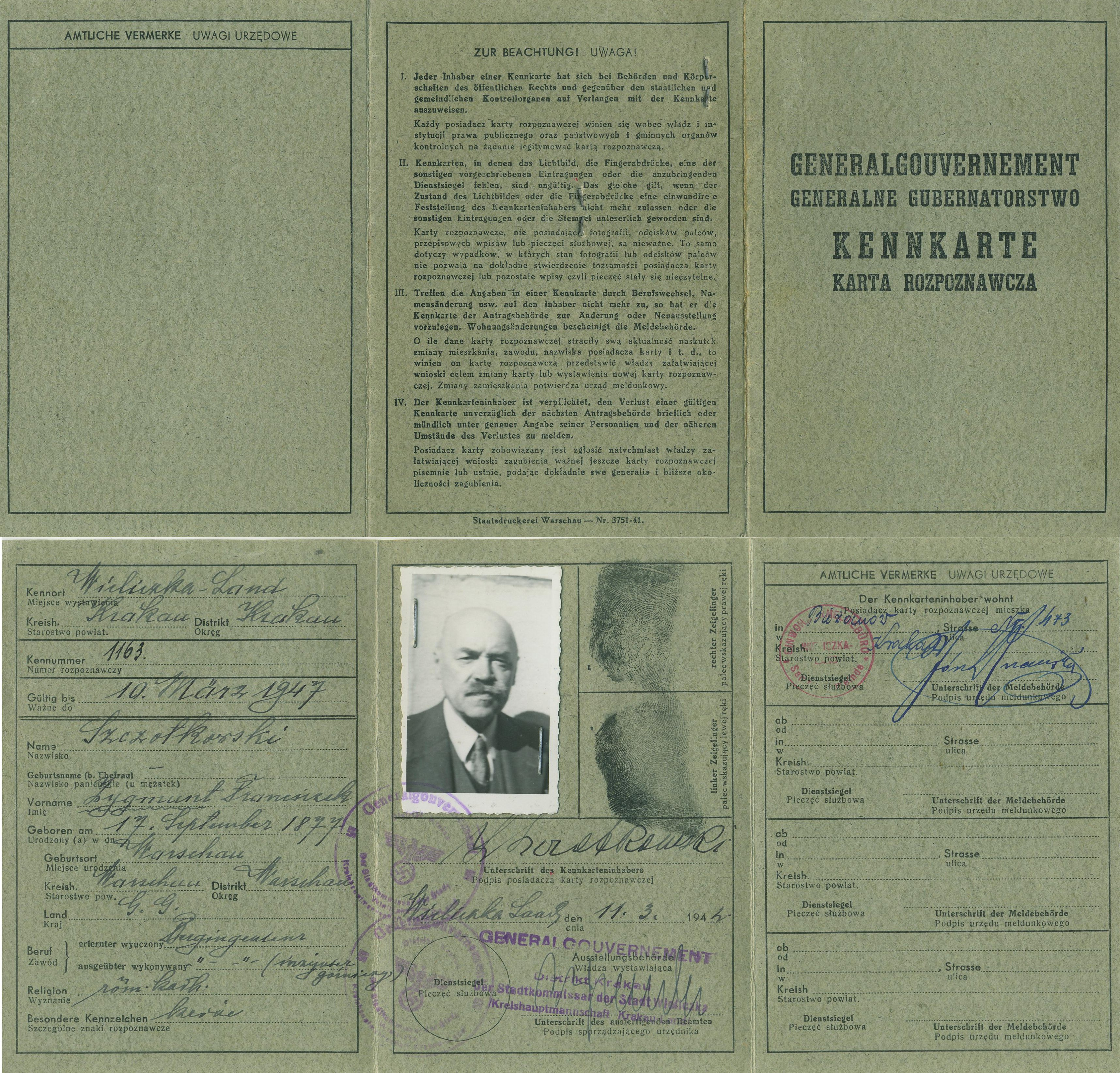 Kennkarte wydana w 1942 roku mieszkańcowi Generalnego Gubernatorstwa